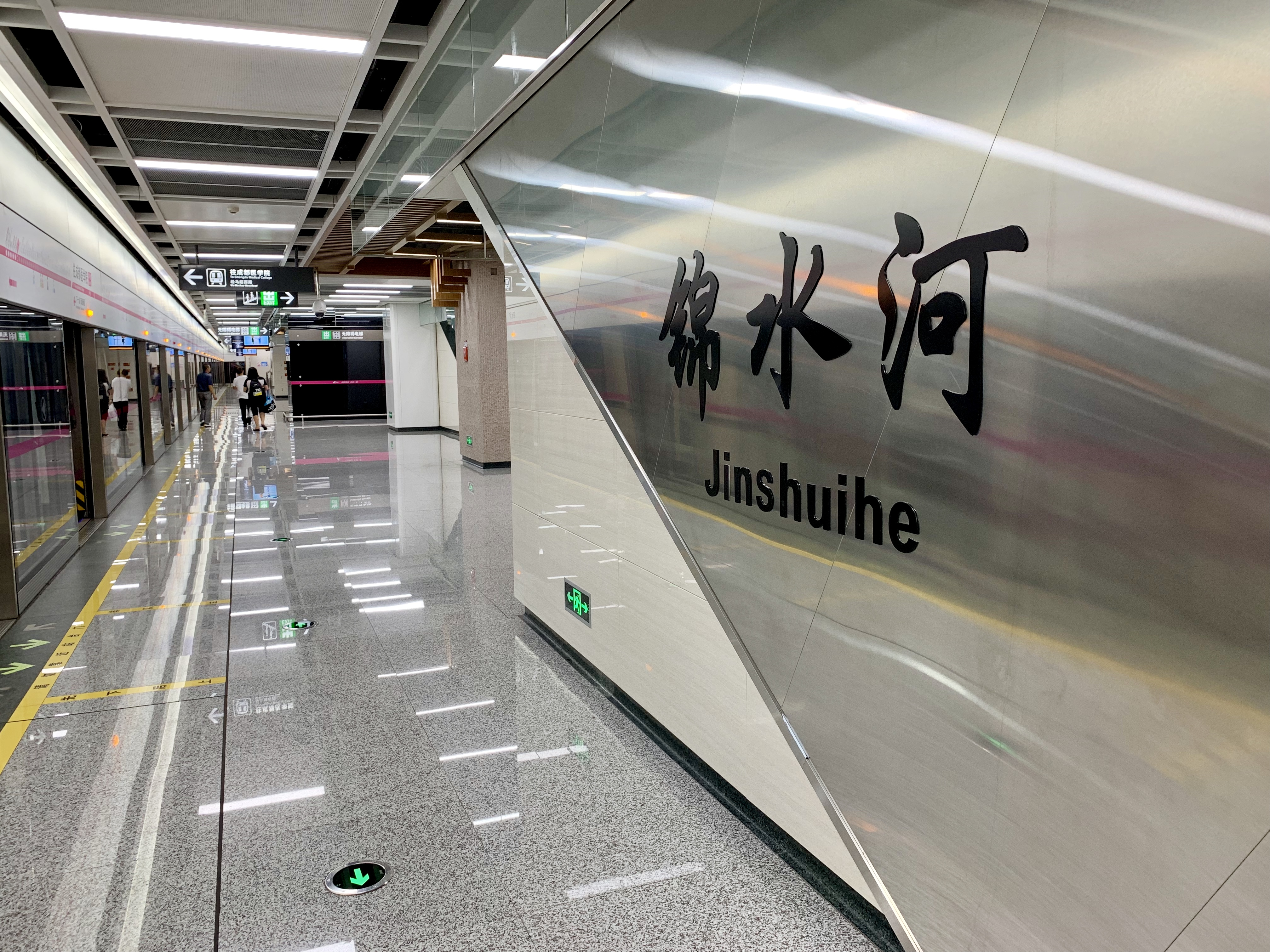 成都地铁锦水河站